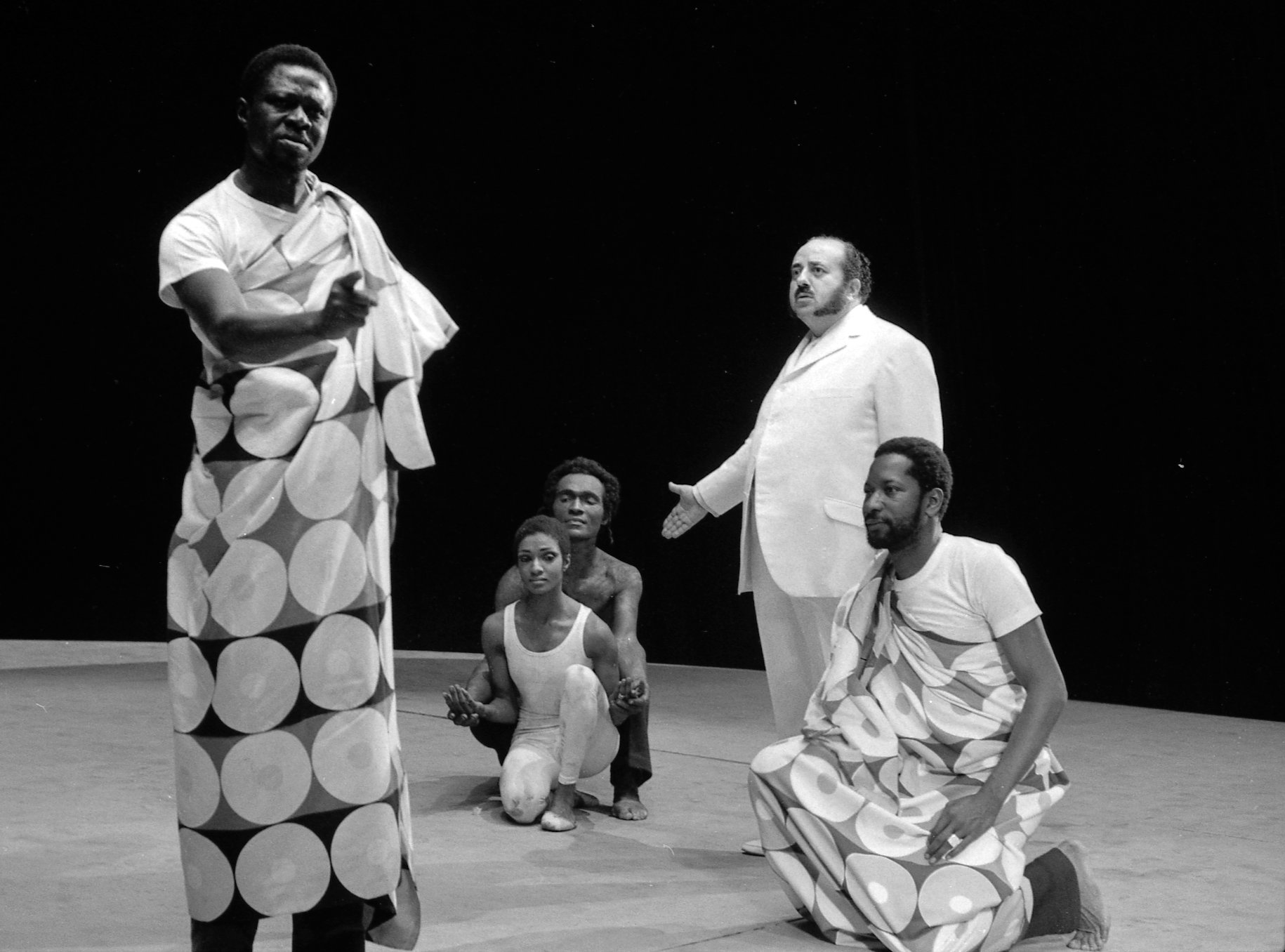 Théâtre du Capitole. Le 11 Janvier 1968. Vue des galas franco-africains de Chakar au théâtre du Capitole.